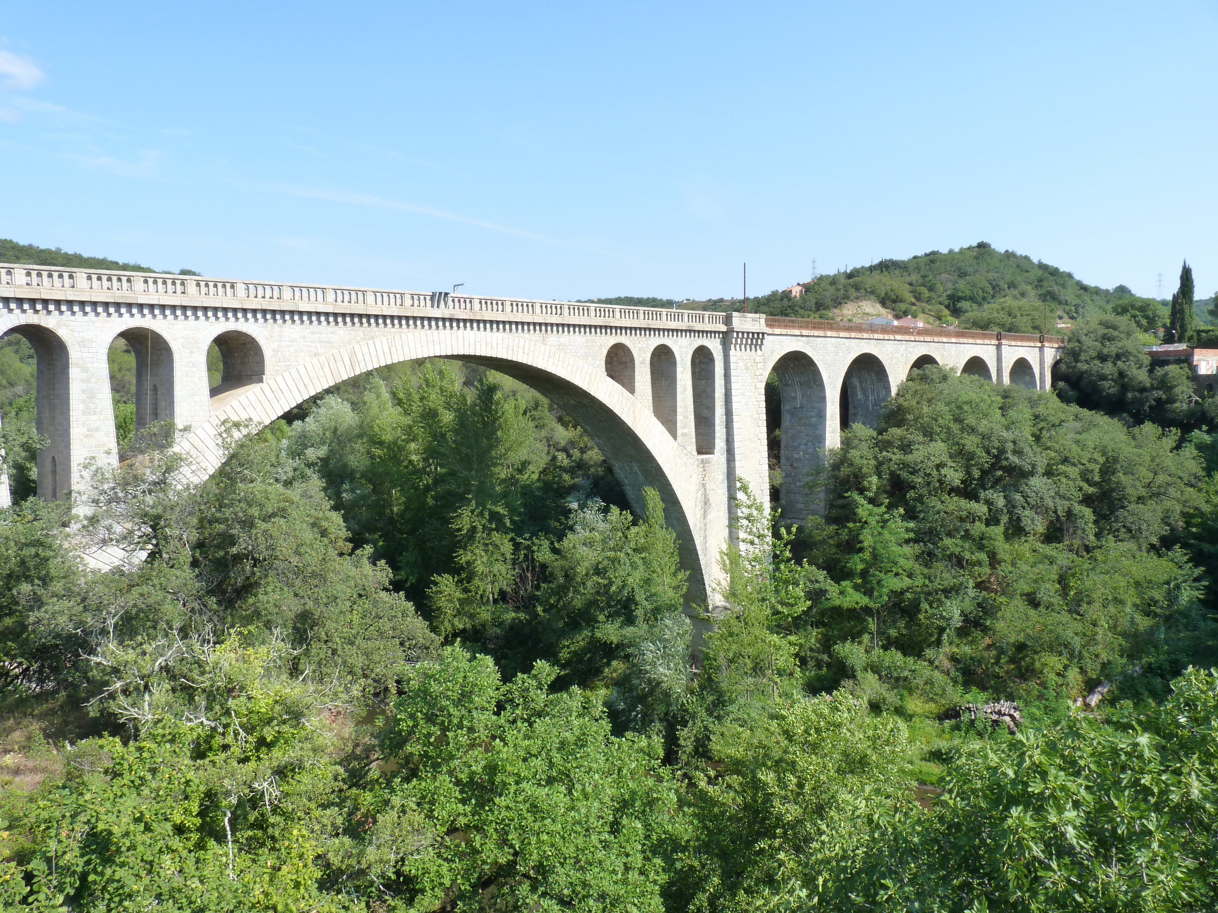 Pont de chemin de fer, Céret (Pyrénées-Orientales, Languedoc-Roussillon, France)